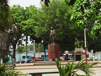 esta de la plaza de punta de mata